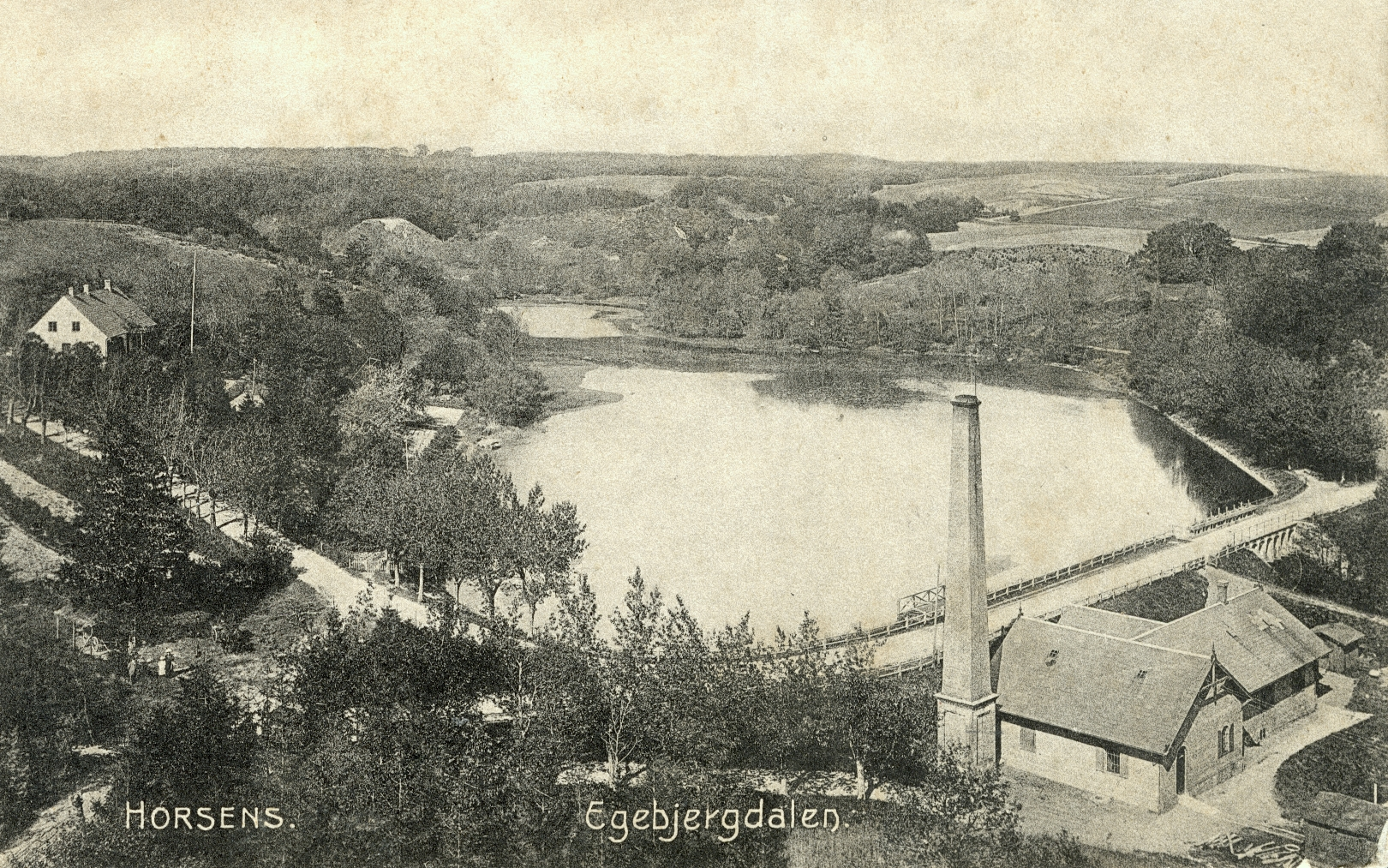 Egebjerg og Egedal (? Egebjergdalen) mellem Horsens og Gedved